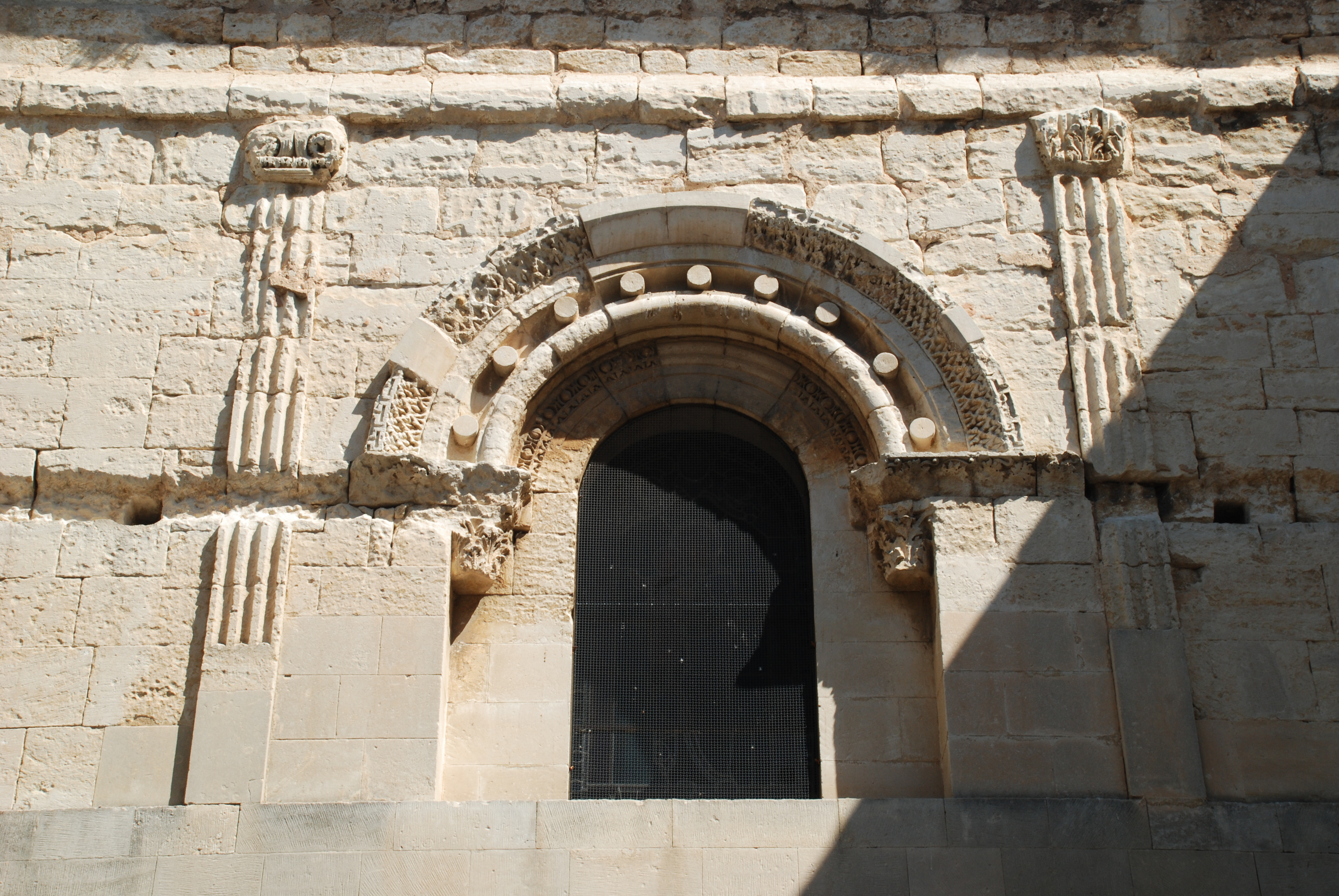 Cathédrale Notre-Dame de Saint-Paul-Trois-Châteaux